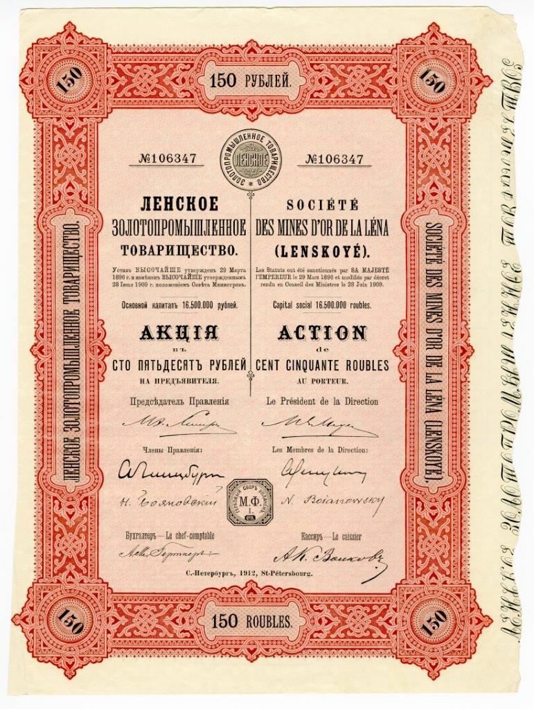 One bearer share par value of 150 roubles of The Lena Gold-Mining Partnership. St. Petersburg, 1912